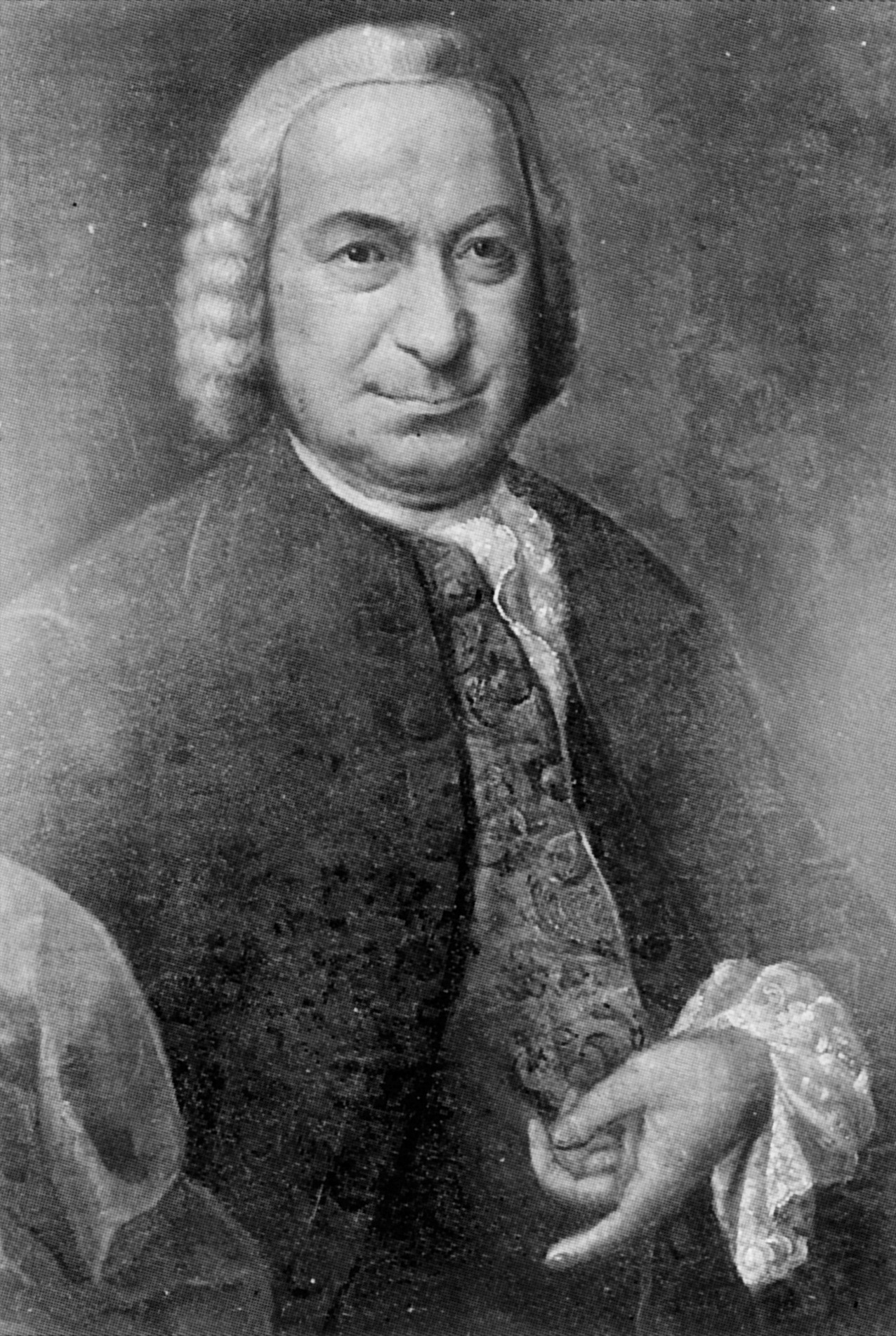 Porträt Heinrich von der Leyens (1708-1782)